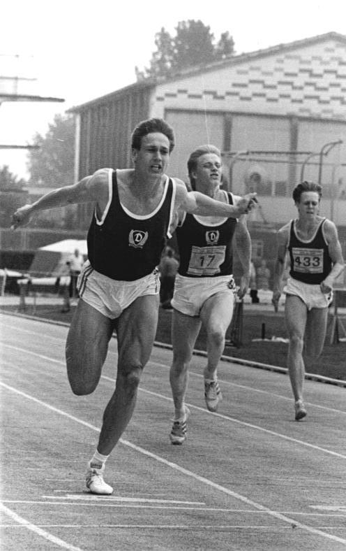 Sven Matthes ADN-ZB Roeske 20.7.88 Berlin: Sportfest mit Europarekord- Beim Junioren-Sportfest stellte der 19jährige Sven Matthes (SC Dynamo Berlin, l.) mit 10,19 s seinen eigenen Europarekord über 100 m ein.